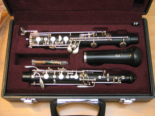 My Yamaha YOB-241 自製照片，現公開予所有人使用，創建者：Glio glio 14:58 2005年12月20日 (UTC)